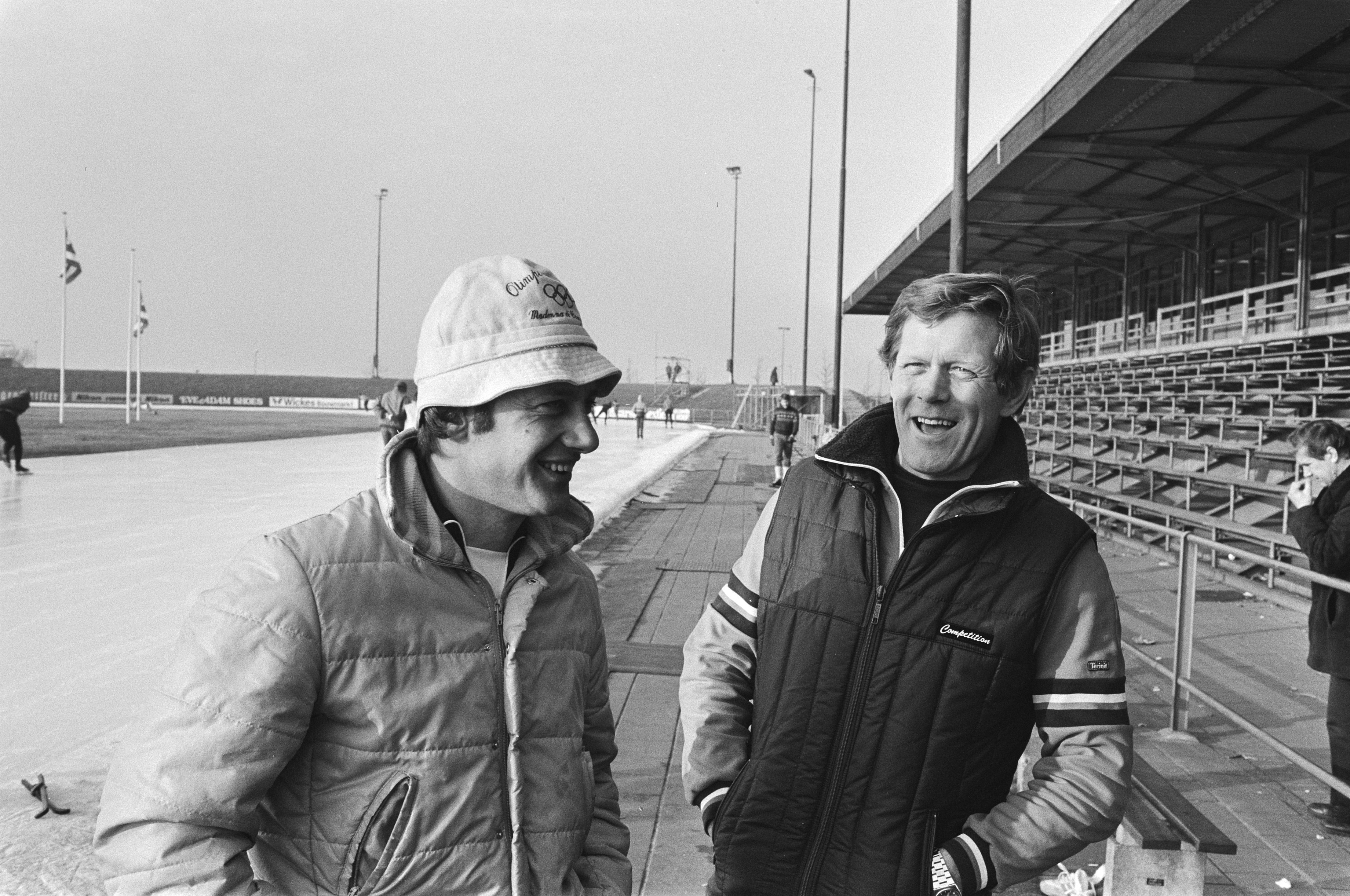 Collectie / Archief : Fotocollectie Anefo Reportage / Serie : [ onbekend ] Beschrijving : Schaatsen WK-Sprint in Alkmaar. Training. Lieuwe de Boer (l.) en trainer Nijholt Datum : 5 februari 1982 Locatie : Alkmaar, Noord-Holland Trefwoorden : schaatsen, sport, trainers Persoonsnaam : Boer, Lieuwe de Fotograaf : Antonisse, Marcel / Anefo Auteursrechthebbende : Nationaal Archief Materiaalsoort : Negatief (zwart/wit) Nummer archiefinventaris : bekijk toegang 2.24.01.05 Bestanddeelnummer : 931-9537